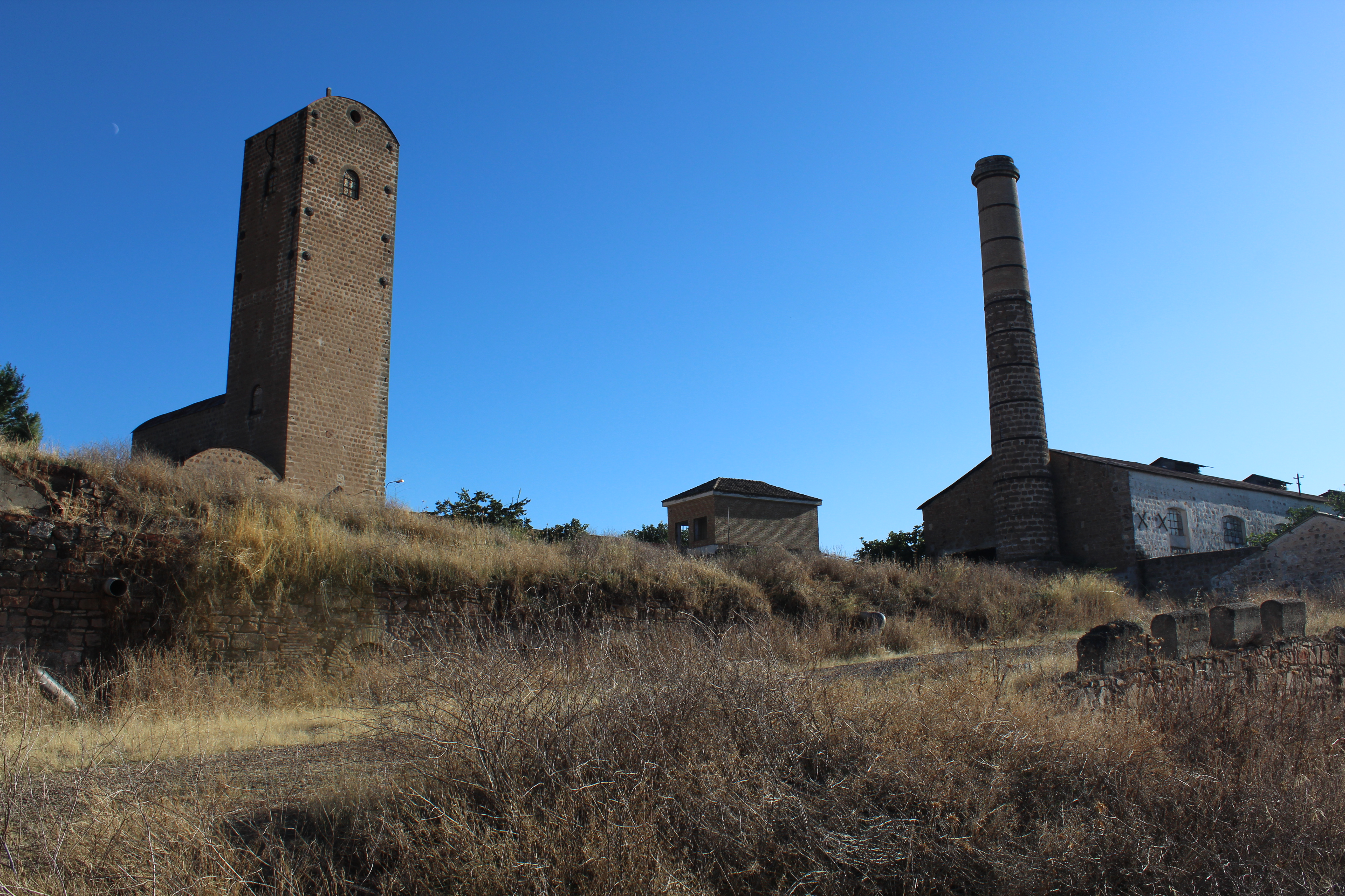 Perfil de la Mina-Fundición La Tortilla.